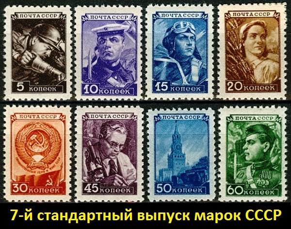 Седьмой стандартный выпуск стал первым послевоенным. Он появился в мае 1948 и издавался до сентября 1954 года. Серия состояла из марок девяти номиналов. На миниатюрах художник Василий Завьялов изобразил: шахтёра (5 копеек), моряка (10 копеек), лётчика (15 копеек), колхозницу (20 копеек), Герб и флаг СССР (30 копеек), учёного (45 копеек), Спасскую башню Московского кремля (50 копеек) и солдата-пехотинца (60 копеек). Впервые стандартная серия была отпечатана способом глубокой печати.